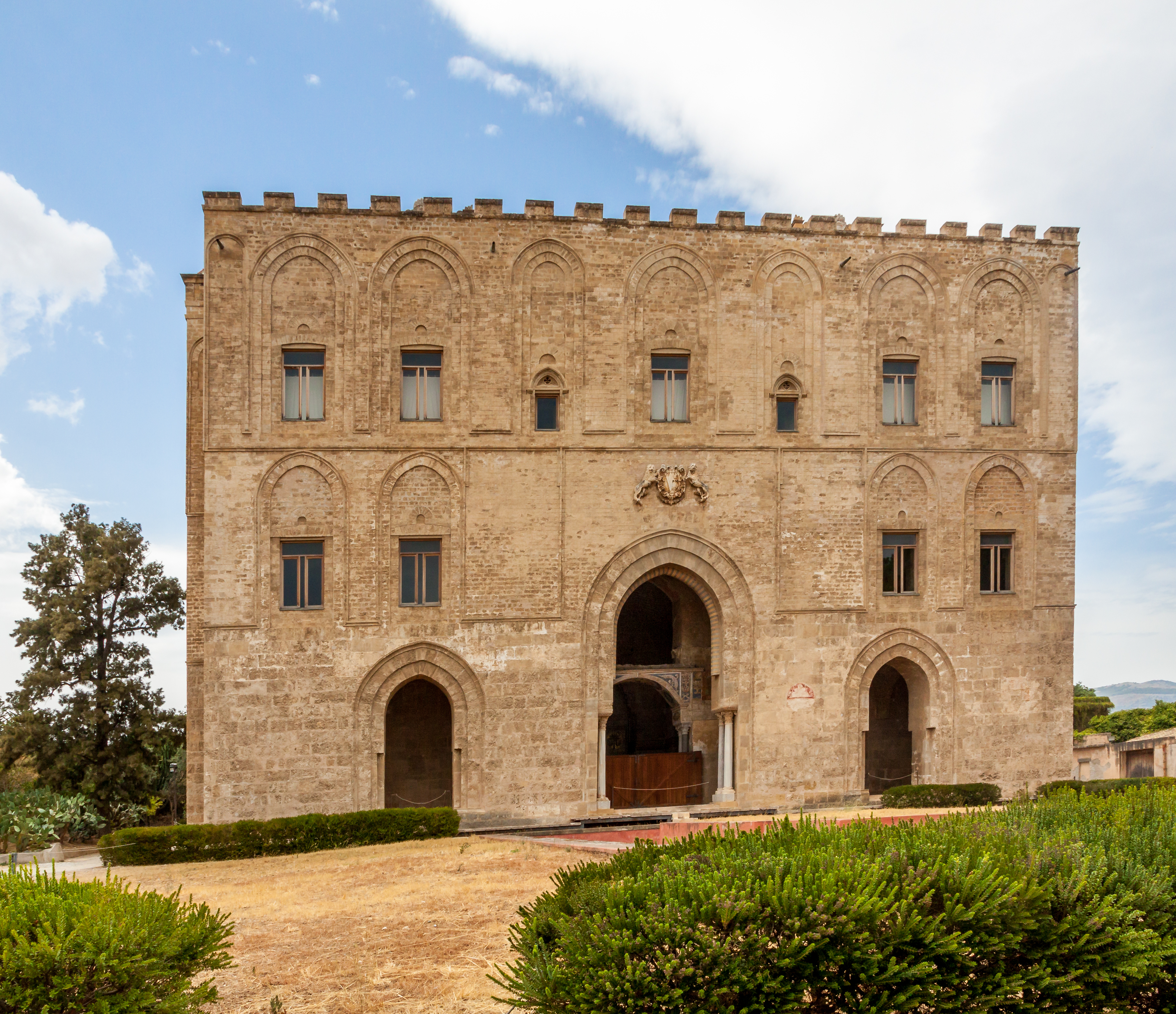 La Zisa